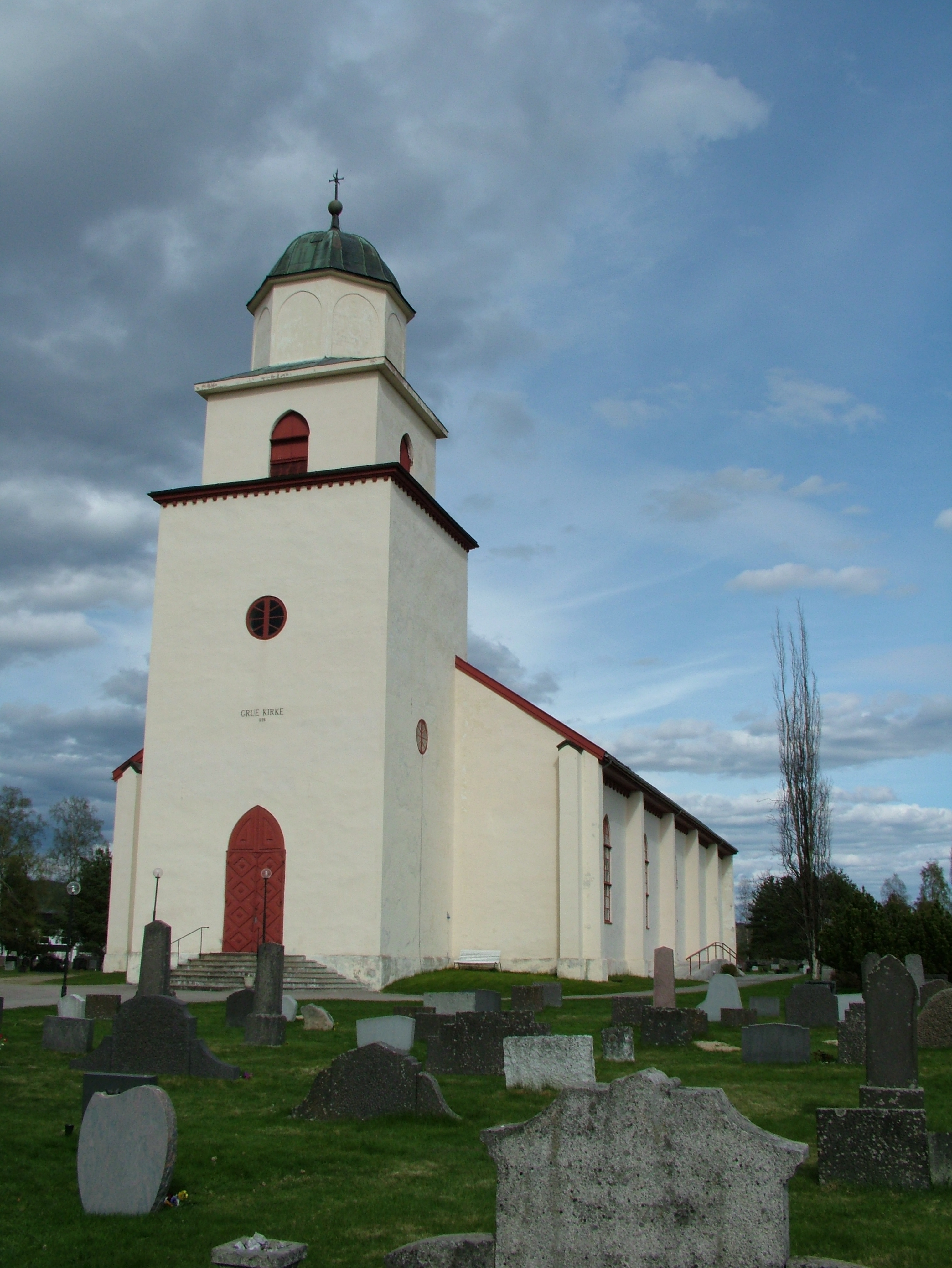 Grue kirke i Grue